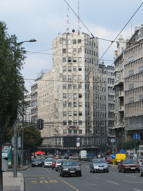 Albanija Palace in Belgrade, Serbia/Le Palace Albanija (Palat Albanija sur la place Terazije à Belgrade, Serbie